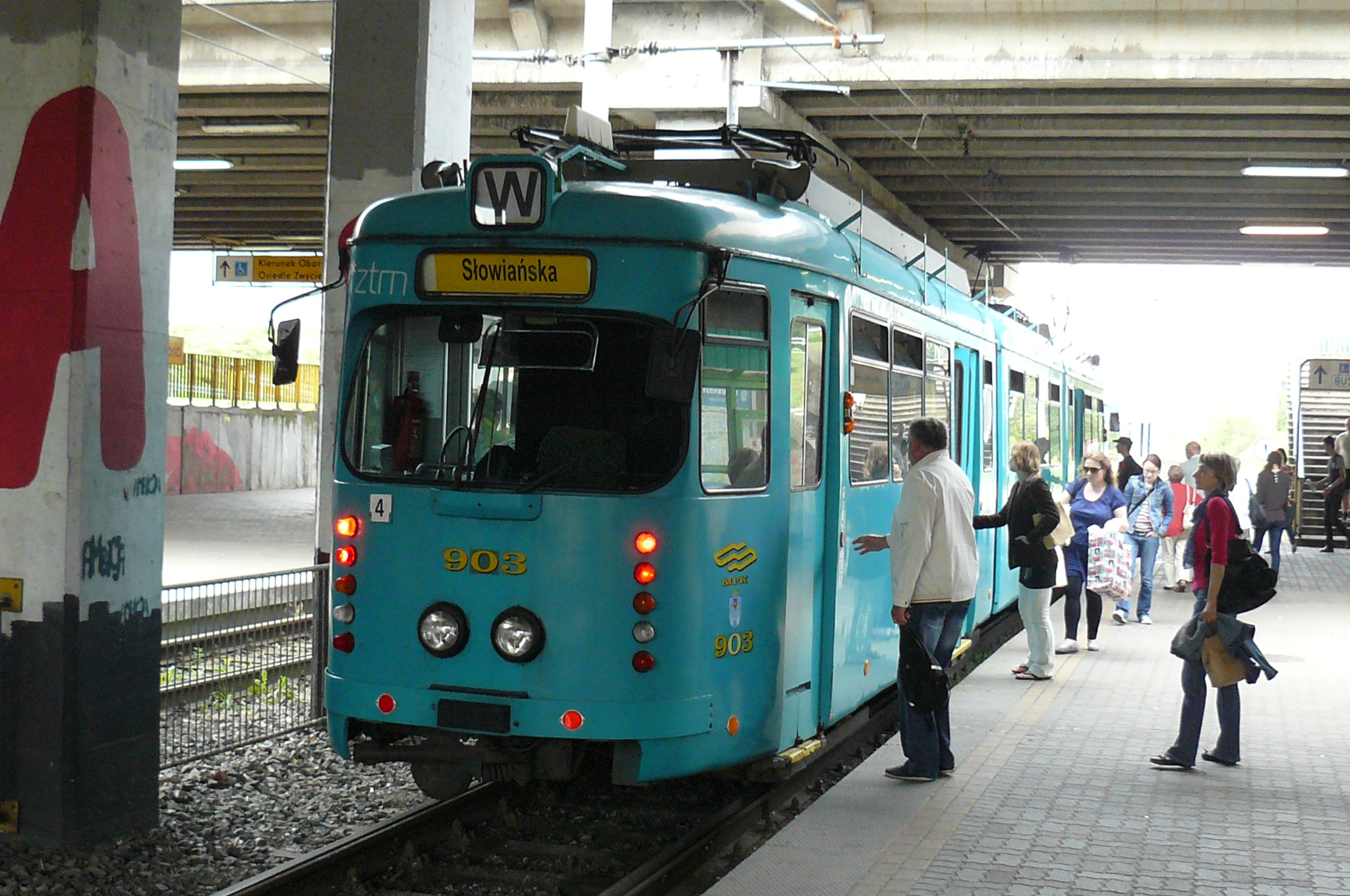 Zastępczy ruch wahadłowy na PST w Poznaniu - sierpień 2012.